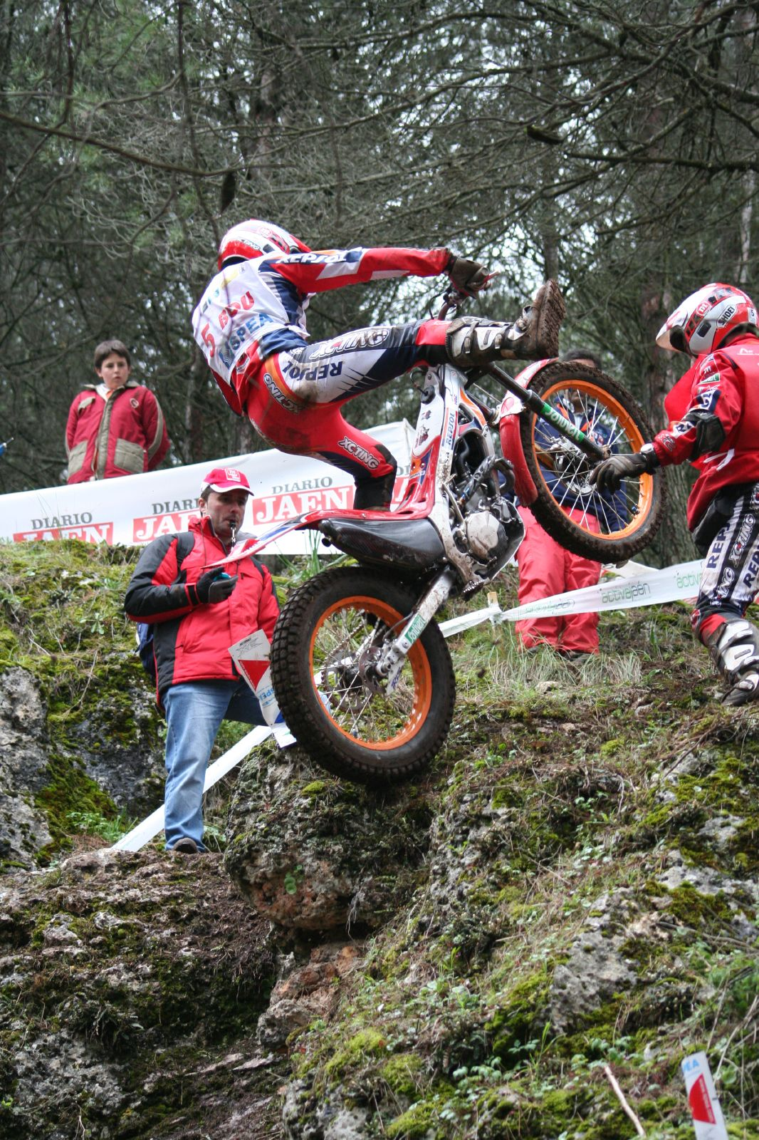 Toni Bou, todo un espectáculo corrigiendo en el aire Toni Bou @ FIM Trial World Championship 2007 R1(Spain)